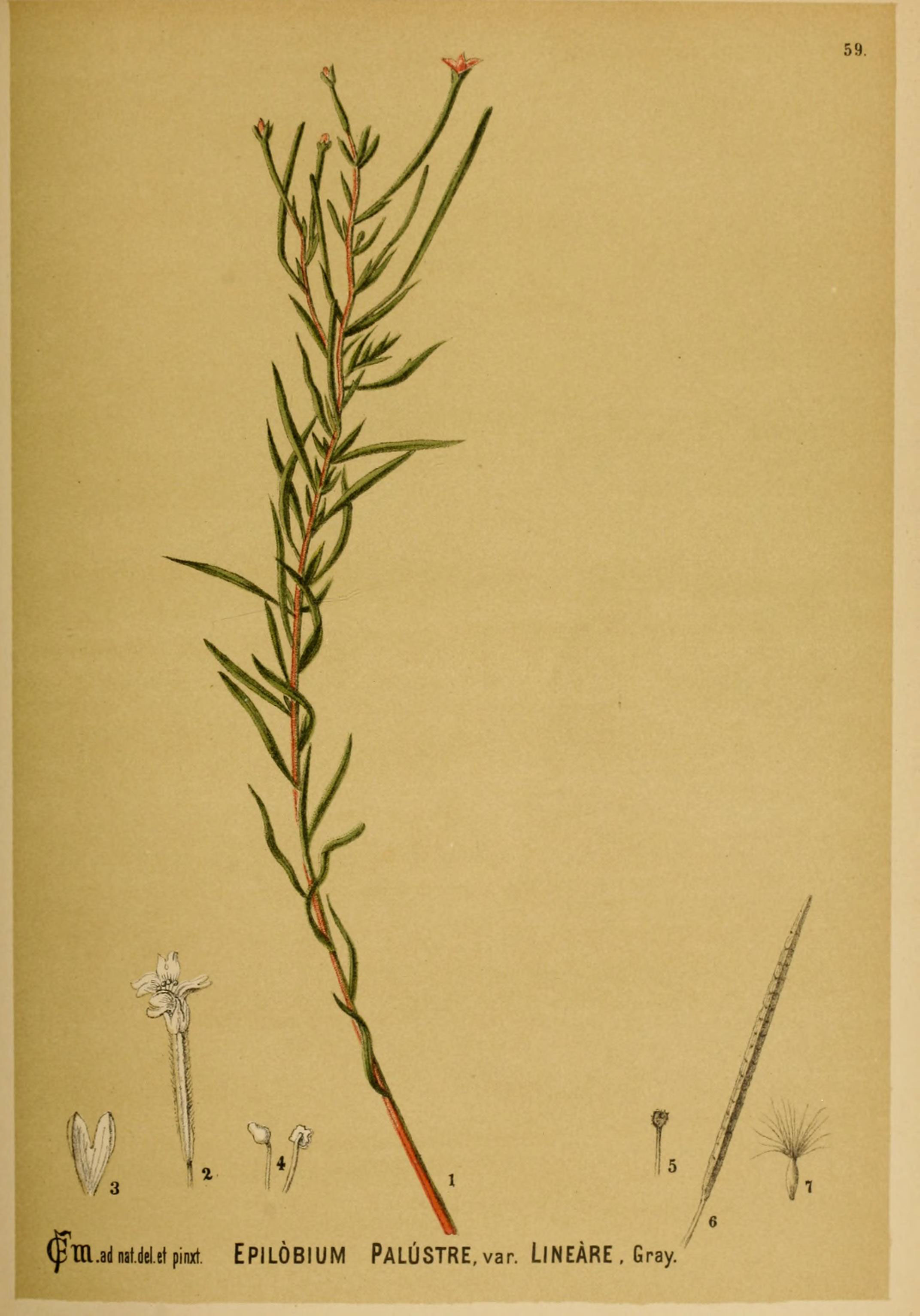 59. ^m.a(l nat.delet pinxt EPILOBIUM PALUSTRE, var. LiNEARE , Gray. ^'- f-"^"^